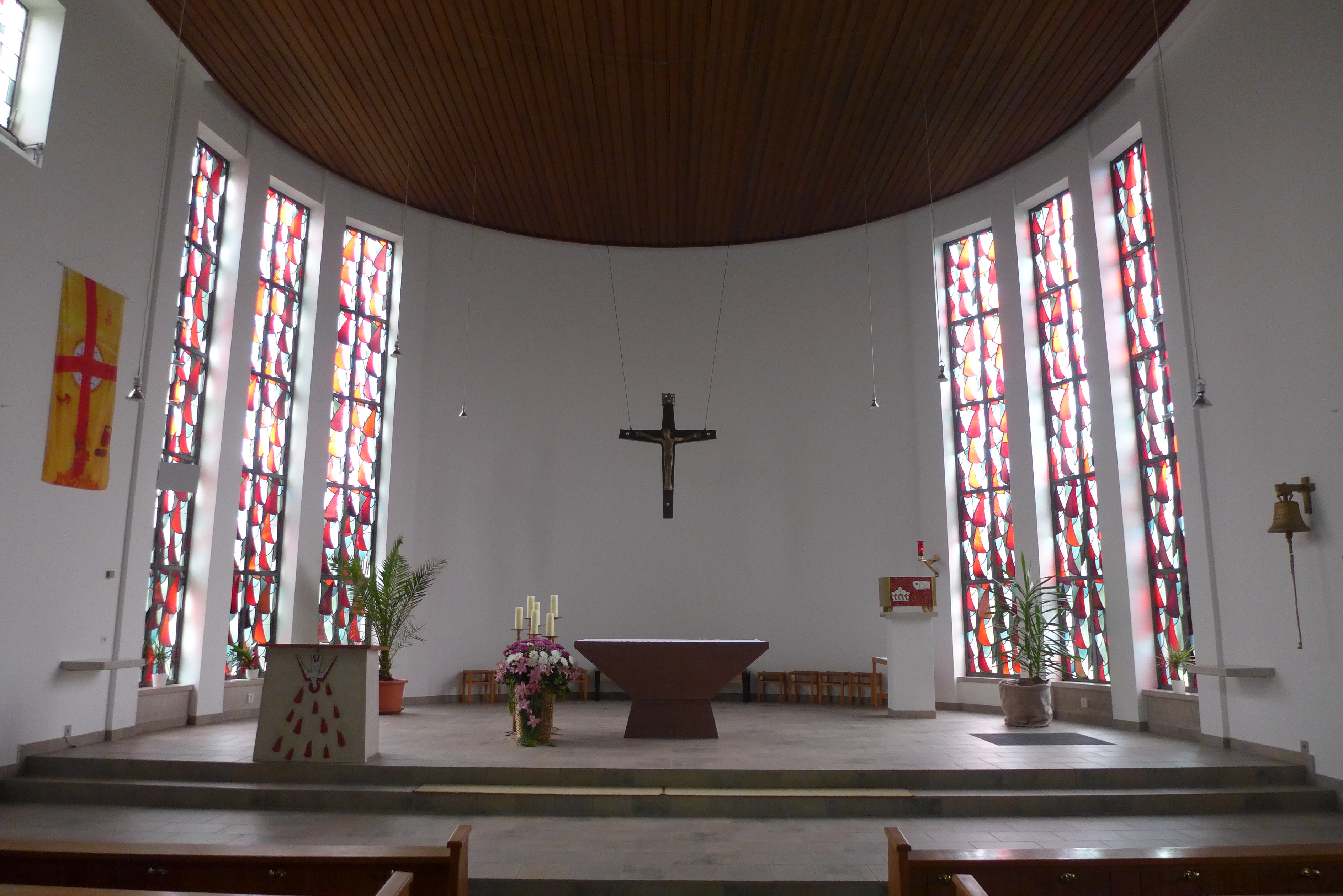 Altar